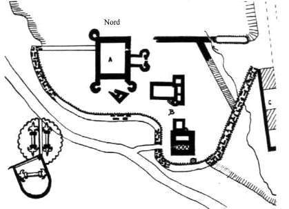 Nach Ausgrabungsfunden rekonstruierter Grundriss der Burg Bellinghausen in Niederbellinghausen bei Wiehl